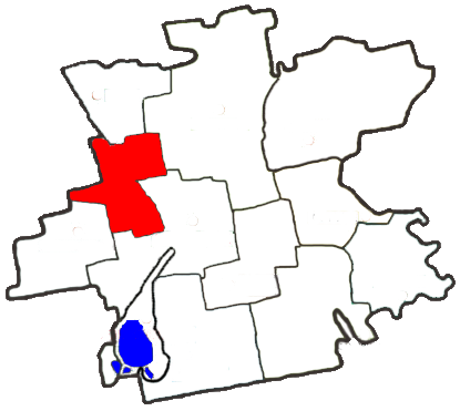 Ниво-Трудівська сільська рада